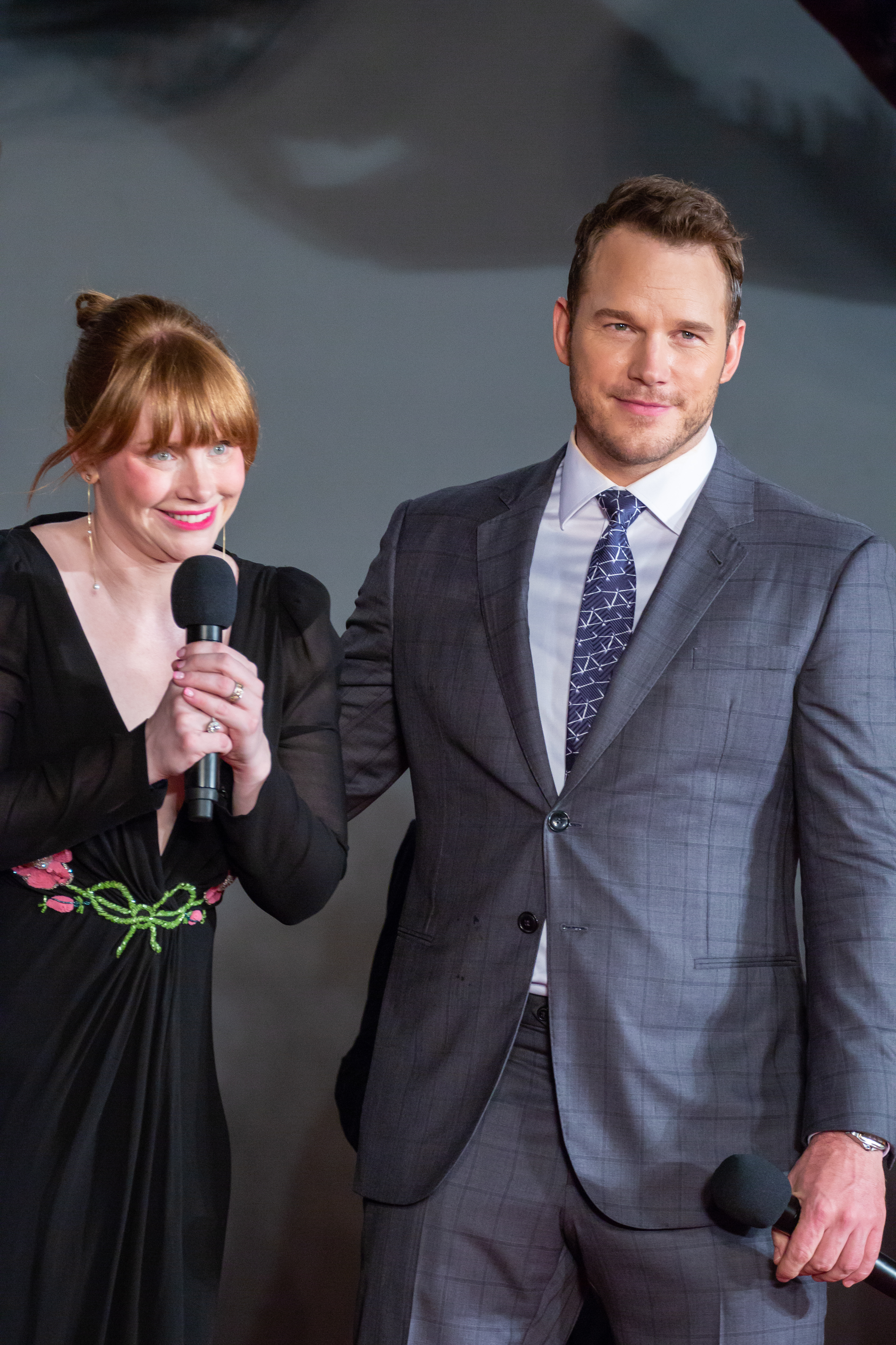 ジュラシック・ワールド/炎の王国 ジャパン・プレミア レッドカーペット クリス・プラット ブライス・ダラス・ハワード